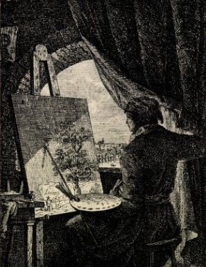 Karel Postl (1769-1818), český klasicistní malíř, kreslíř a grafik.